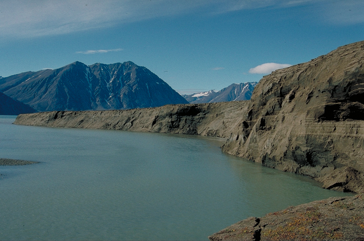 Klint langs vestsiden af Zackenberg-elvens udløb